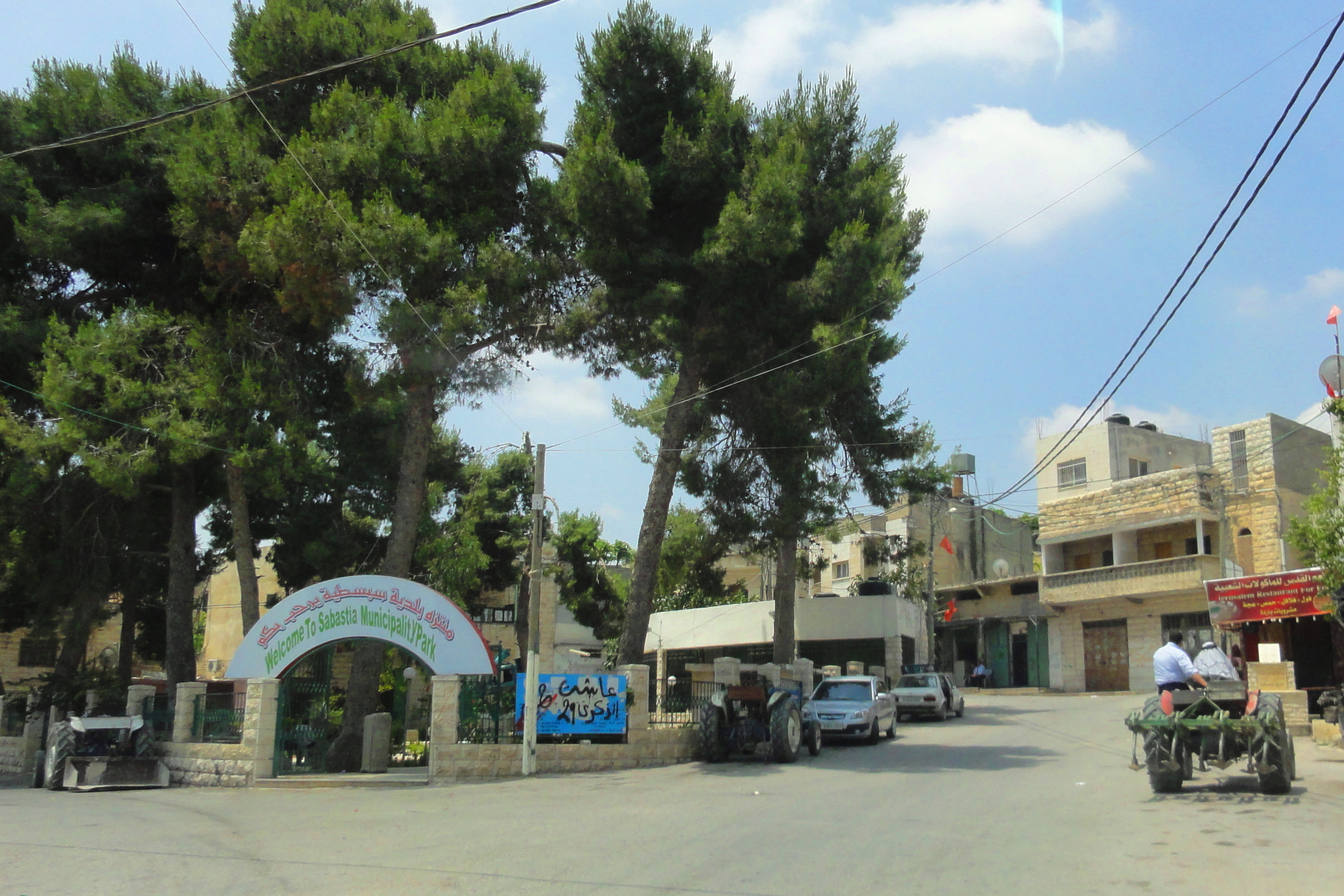 Nablus